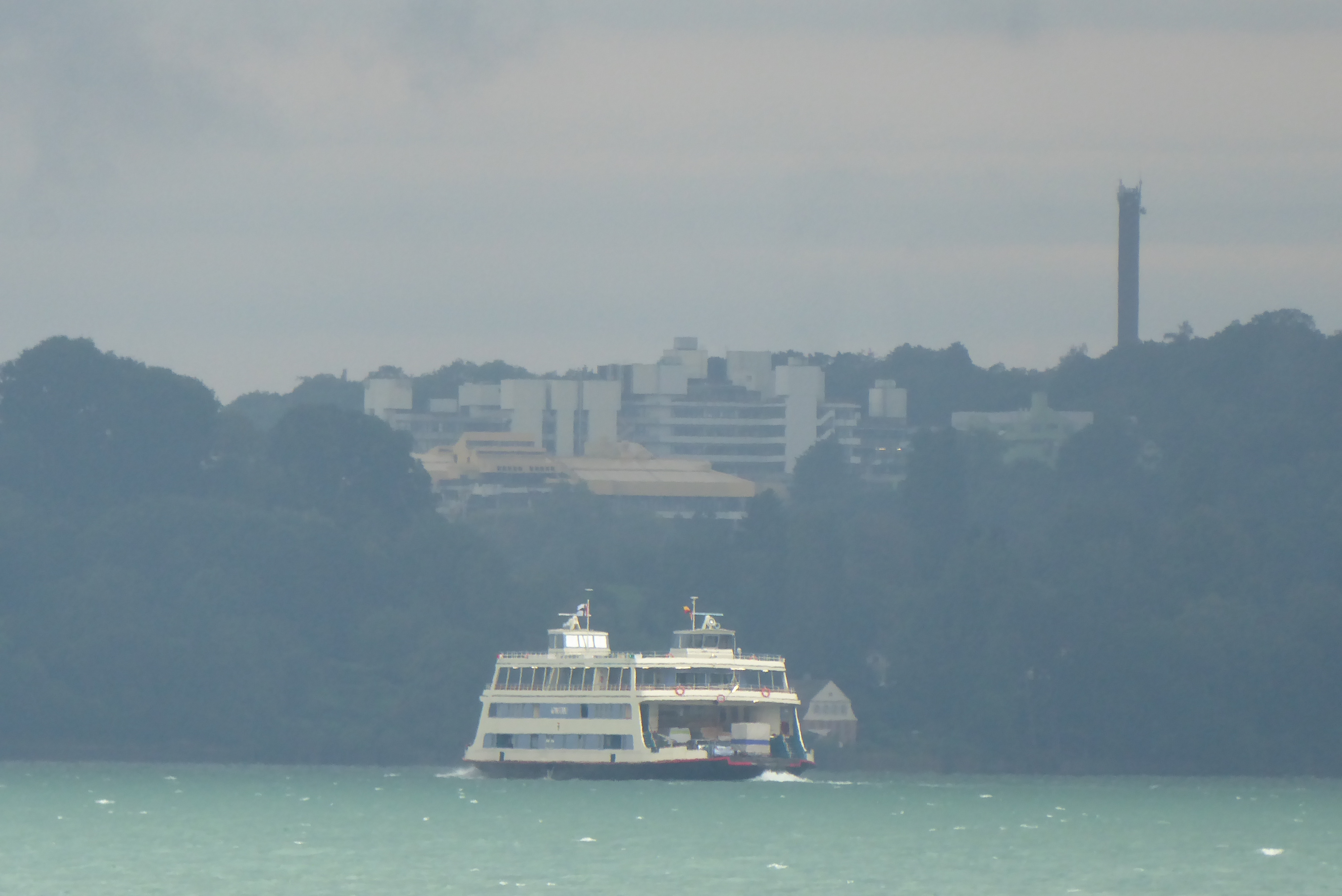 Konstanz Universität